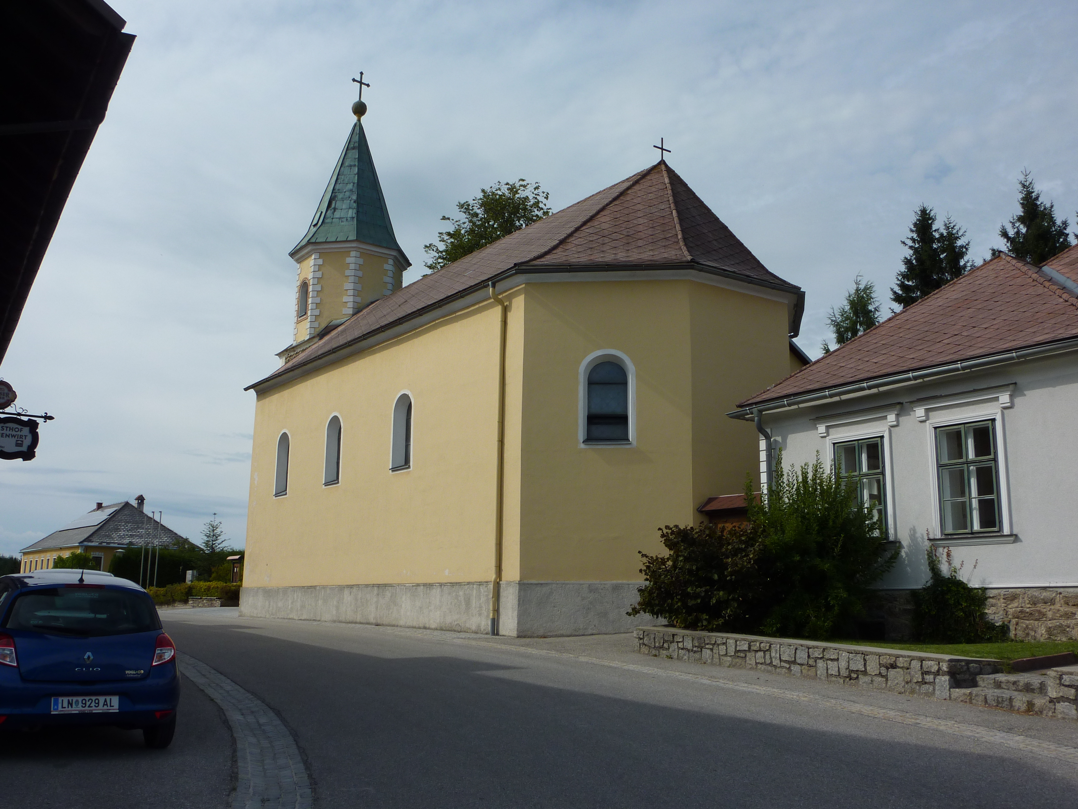 Pfarrkirche, Bärnkopf, Niederösterreich